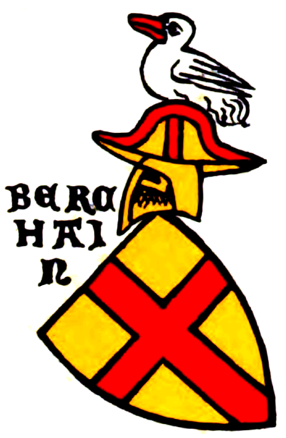 Wappen der Berckheim (hier Berchain)